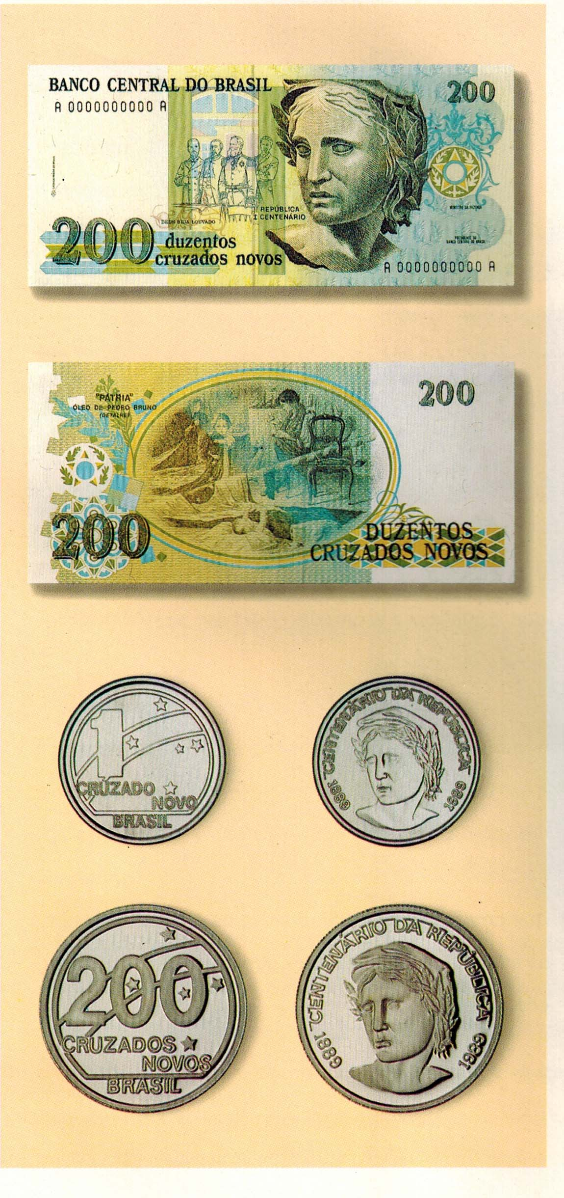 Cédulas e moedas emitidas em 1989 pelo Banco Central do Brasil, em homenagens ao centenário da proclamação da república.